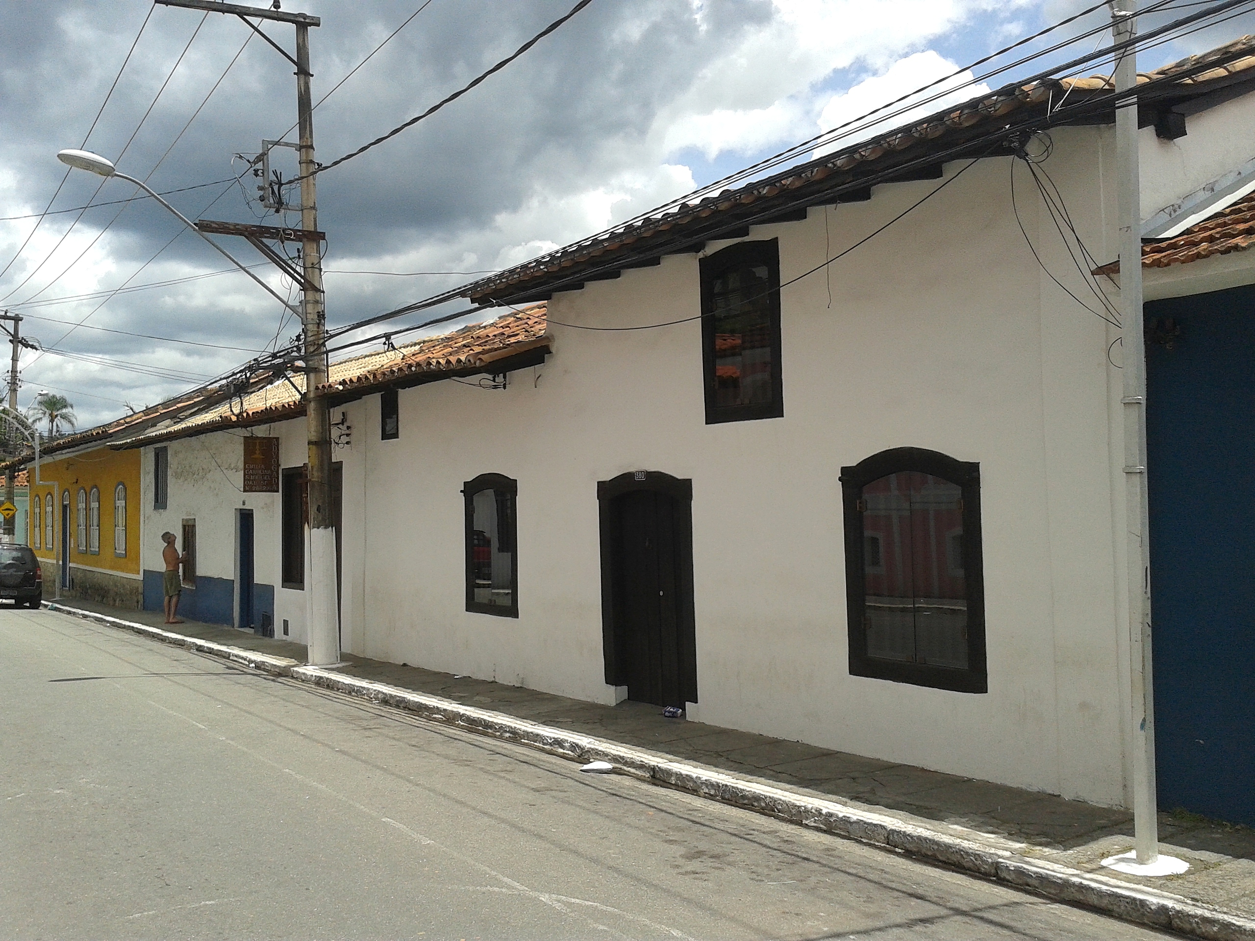 Português do Brasil: Casario, Santana de Parnaíba, SP, Brasil.